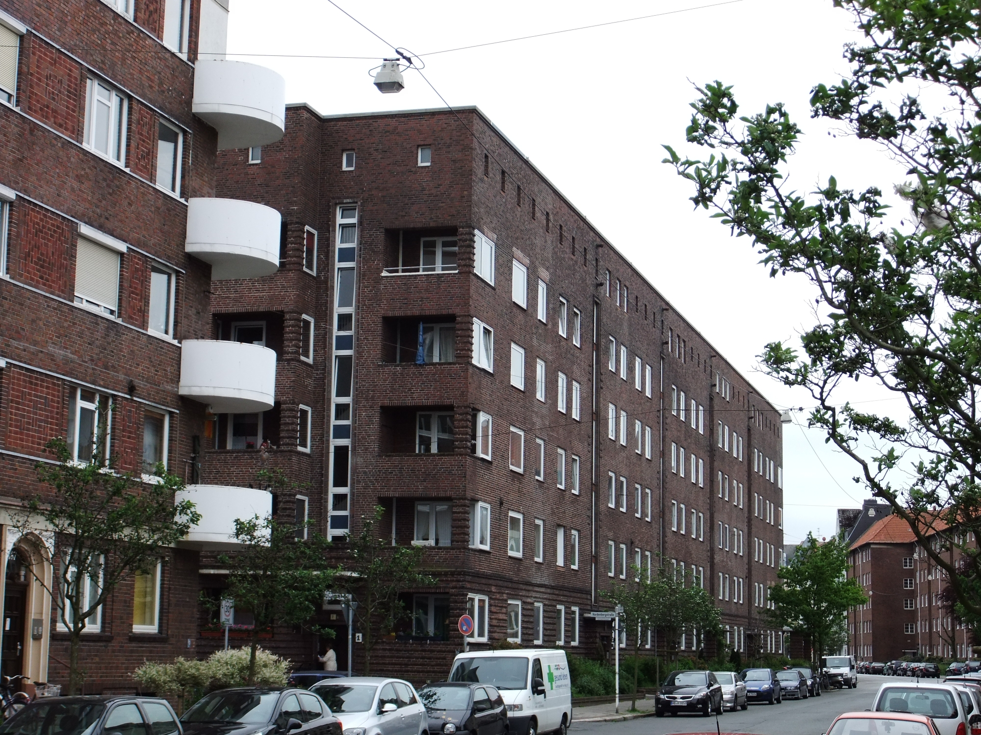 Städtische Wohnhausgruppe X in Bremerhaven, Bürgermeister-Smidt-Straße 173 . Das abgebildete Objekt ist ein geschütztes Kulturdenkmal in der Freien Hansestadt Bremen, mit der Nr. 3275 beim Landesamt für Denkmalpflege registriert.